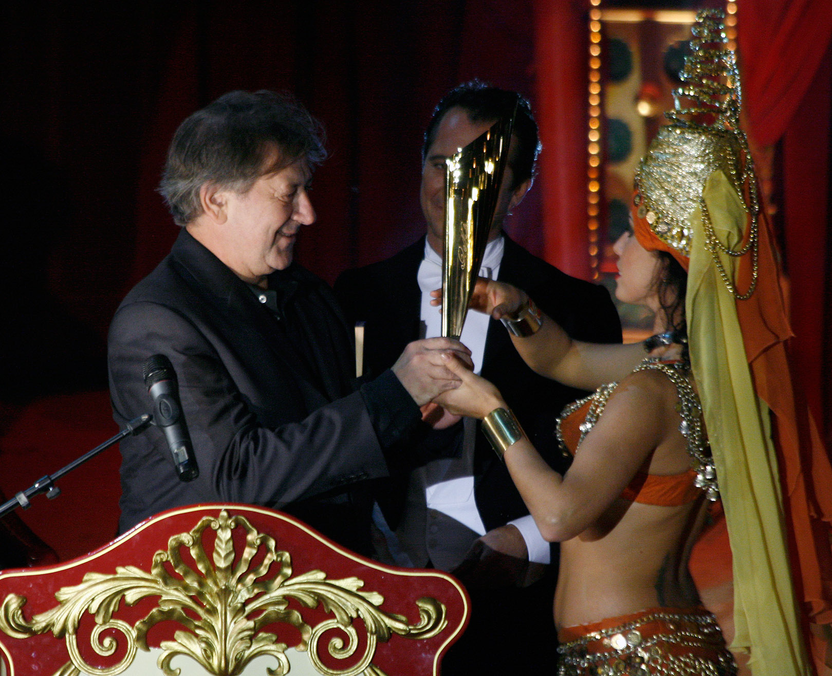 André Jung, ausgezeichnet als Bester Schauspieler, während der Verleihung des Nestroy-Theaterpreises 2009 (Circus Roncalli auf dem Wiener Rathausplatz).